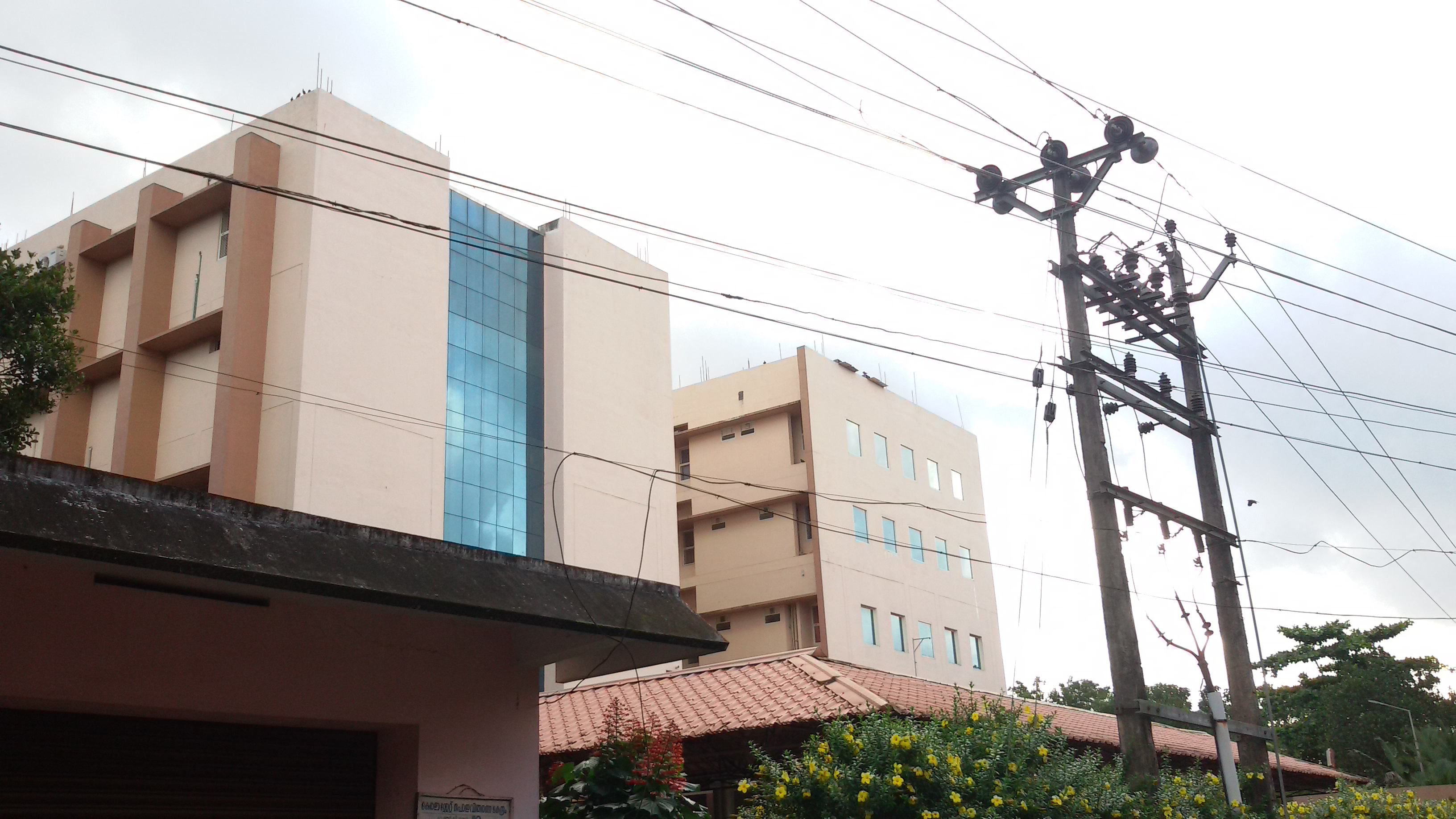 സഞ്ജീവിനി മൾട്ടിസ്പെഷ്യലിറ്റി ഹോസ്പിറ്റൽ, ആലകോട്